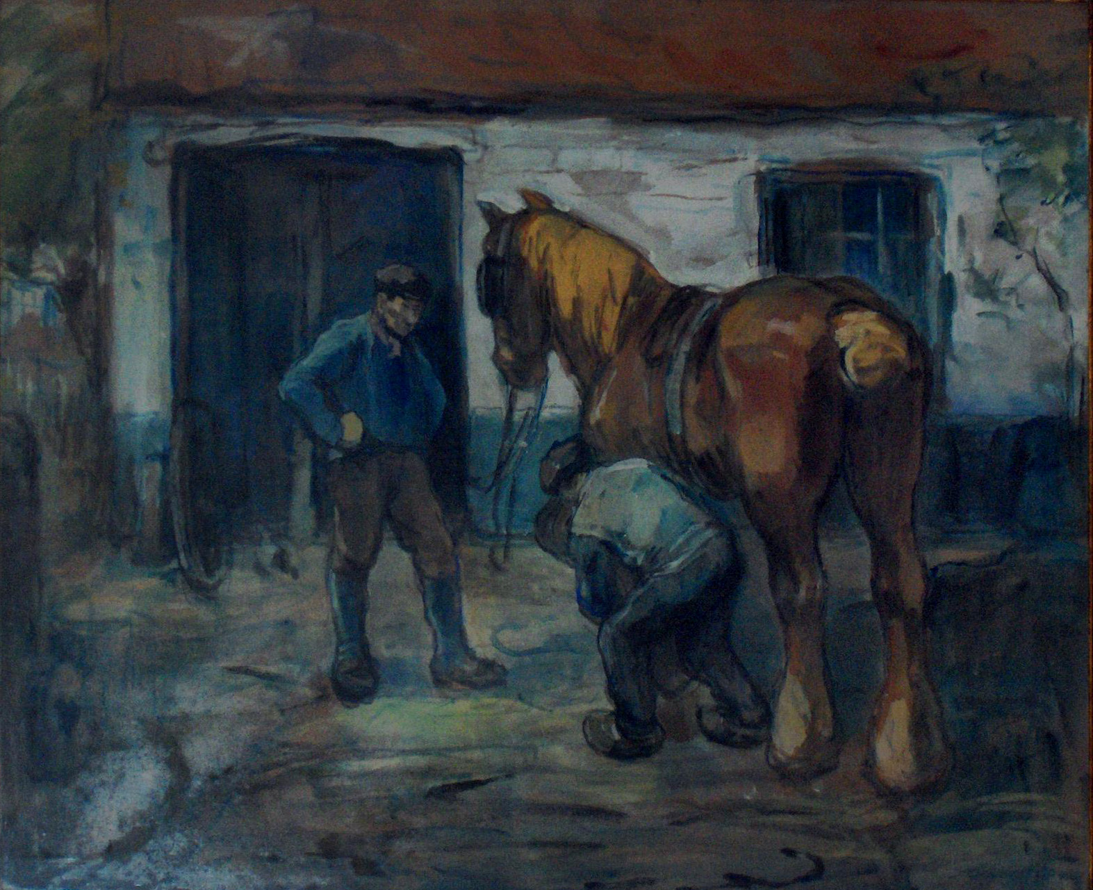 "De oude smidse van "Het Kalf"; pastel door Louis Ludwig (1856-1925); gemeentelijk patrimonium Knokke-Heist, België